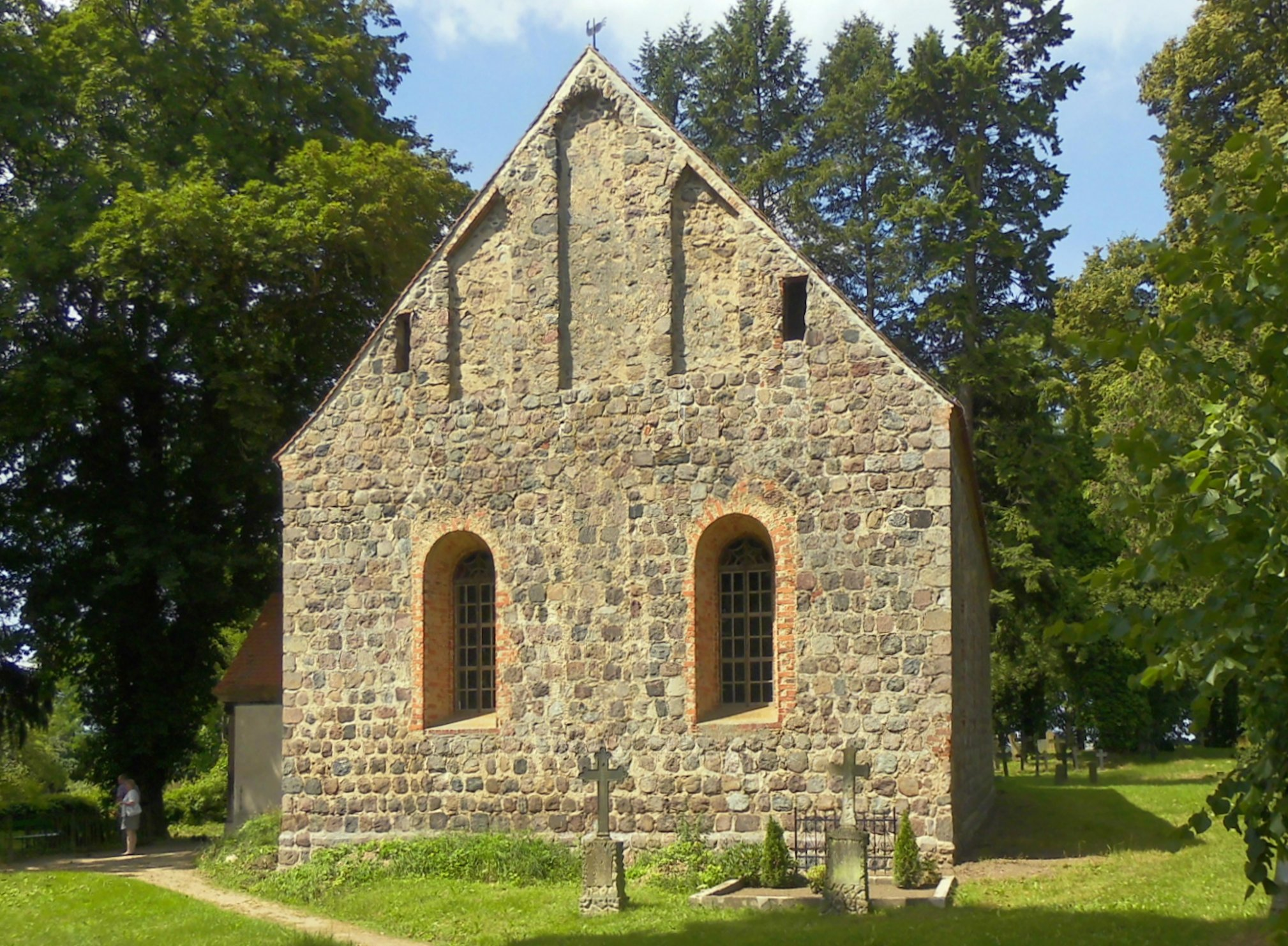 Dorfkirche in Thomsdorf, Gemeinde Boitzenburger Land, Landkreis Uckermark, Deutschland